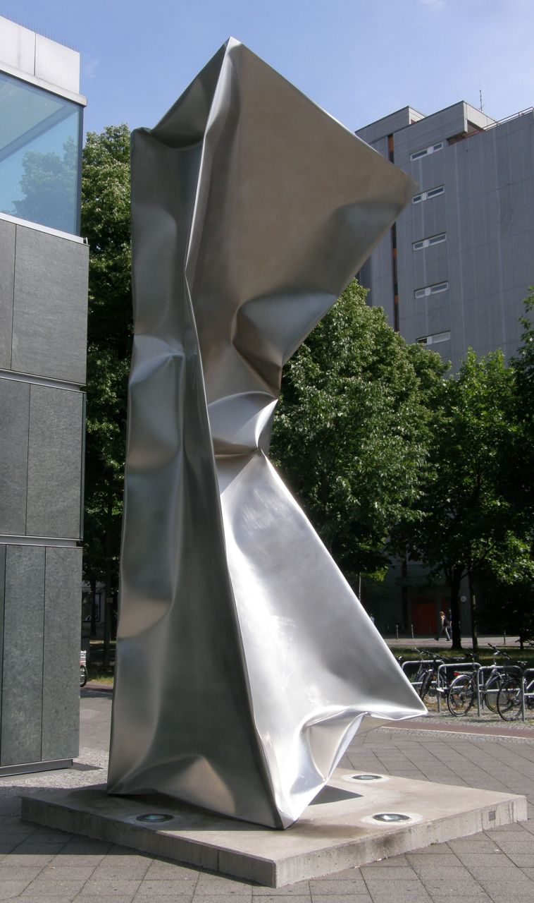 Ewerdt Hilgemann: Cerberus. 2000, Stahl. Bundesallee Ecke Nachodstraße, Berlin-Wilmersdorf